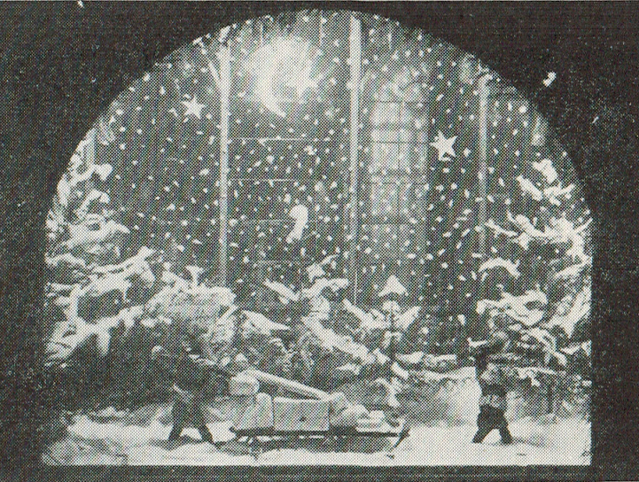 Turun vanu joulu 1928